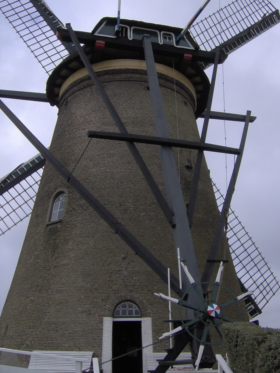 Kinderdijk in Neederlands